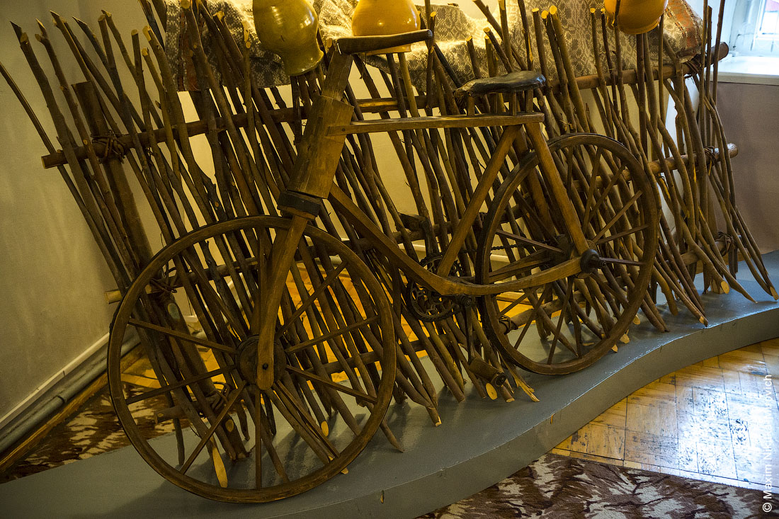 Пінск. Музей Беларускага Палесся. Драўляны веласіпед